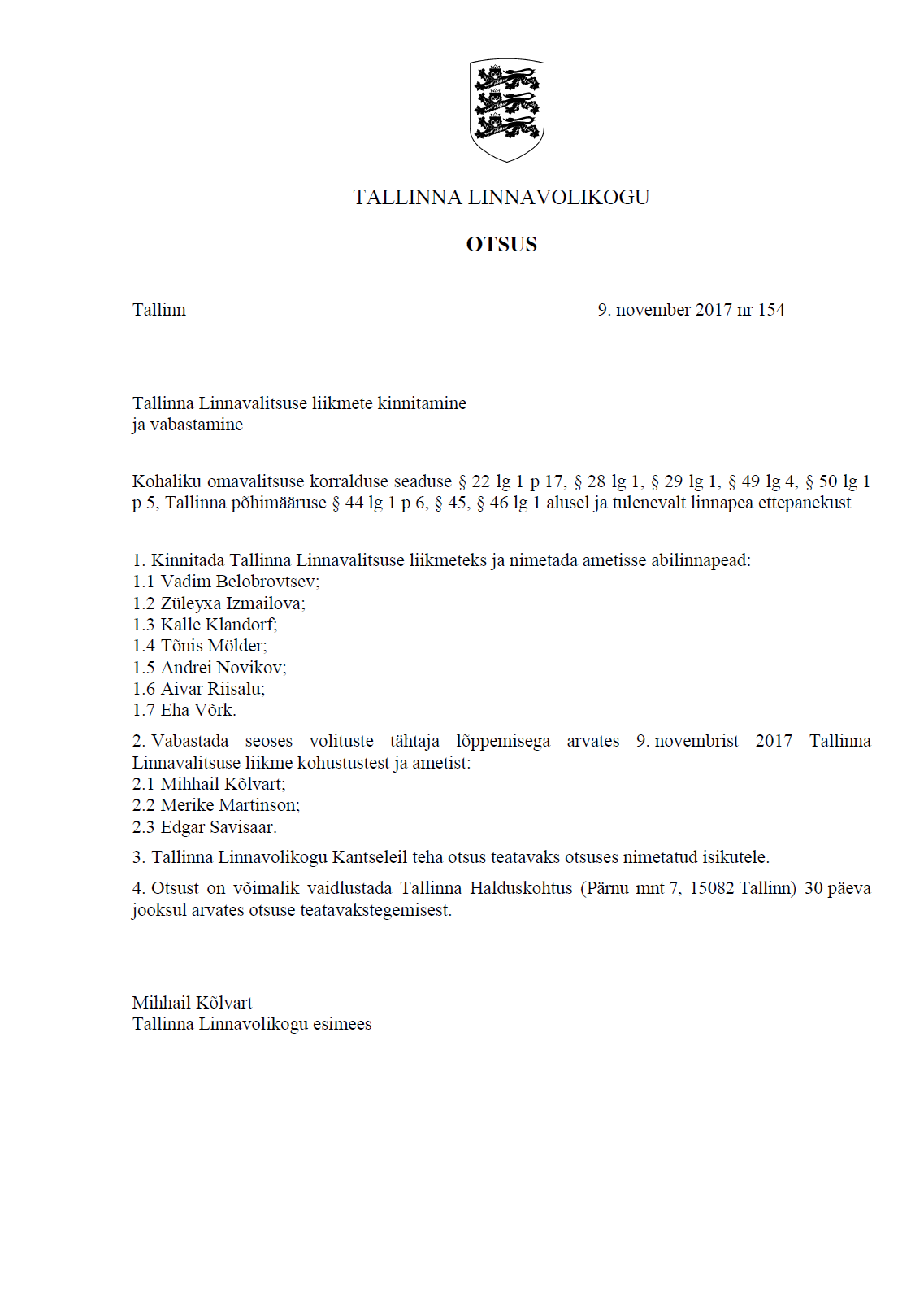 Tallinna linnavolikogu 09.11.2017 otsus nr 154 "Tallinna Linnavalitsuse liikmete kinnitamine ja vabastamine".